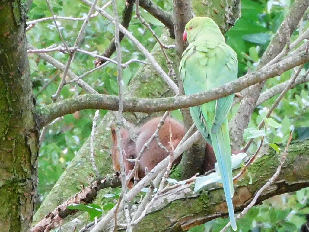 Écureuil et péruche d'île de france